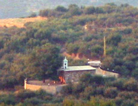 Martmoura-13-04-2007.jpg